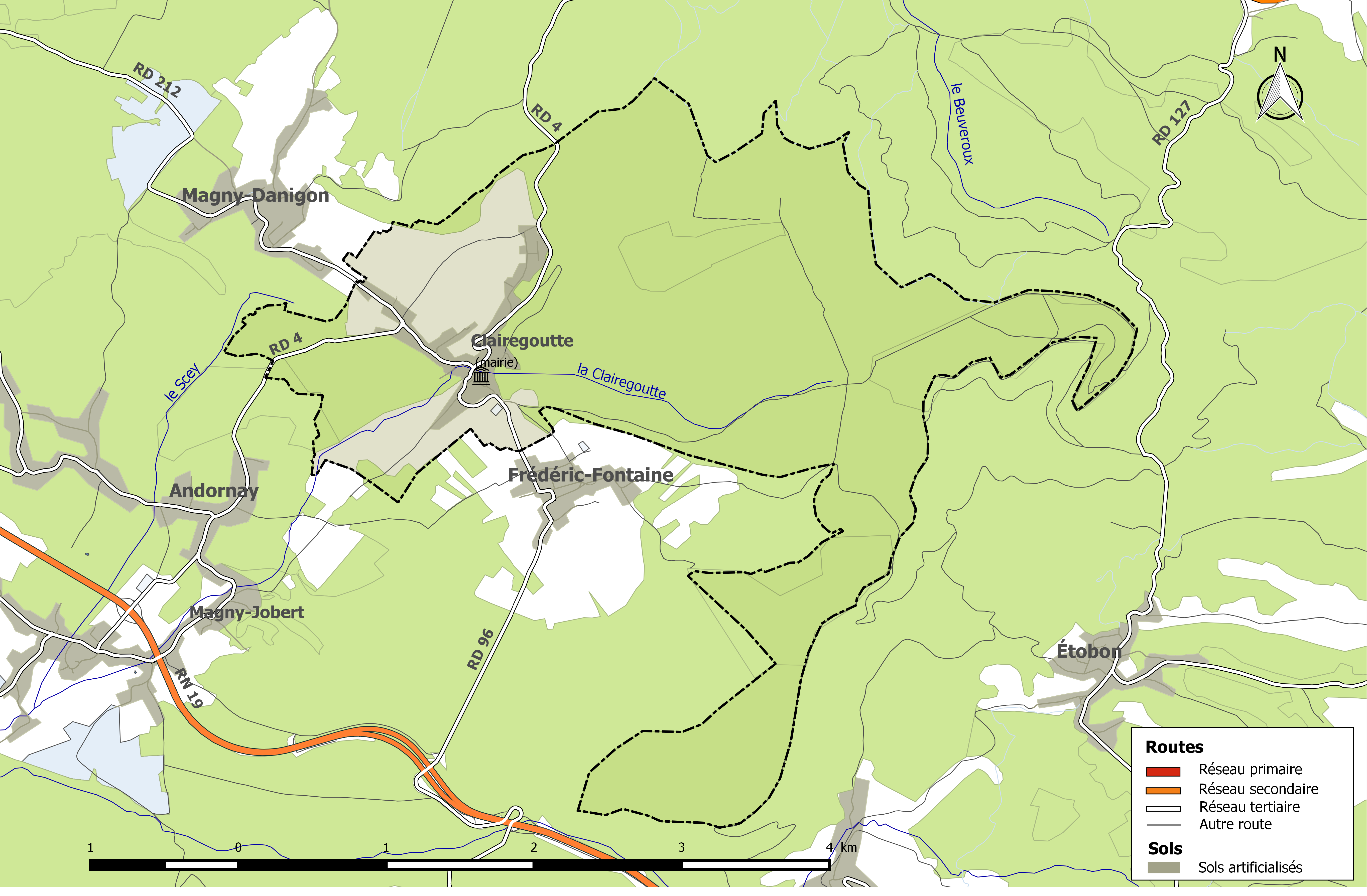 Réseaux hydrographique et routier de la commune de Clairegoutte (Haute-Saône - France)